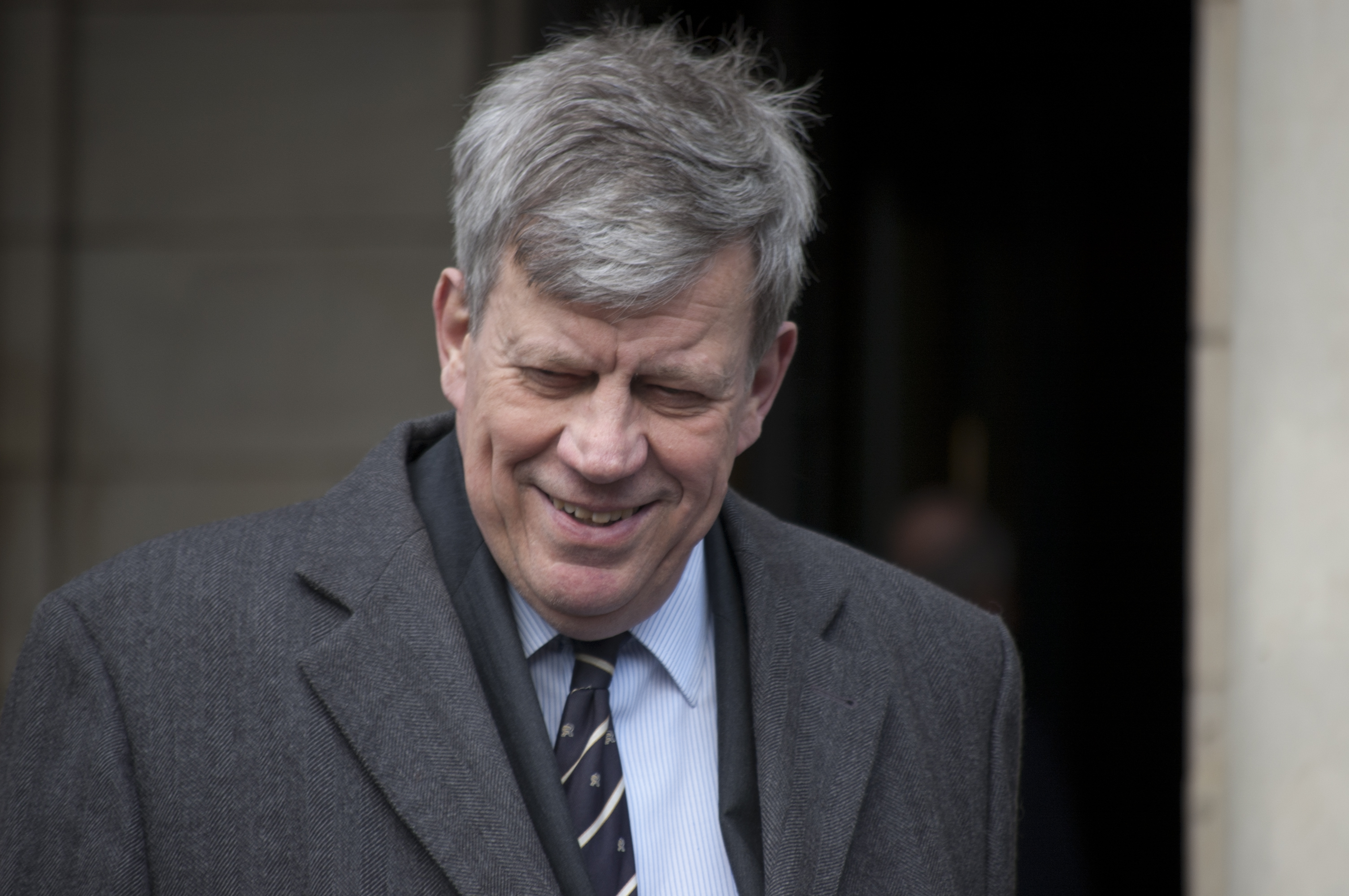 Ivo Opstelten (VVD) voor het Rotterdamse stadhuis. Opstelten, tegenwoordig minister van Veiligheid en Justitie , was een tijdlang burgemeester van Rotterdam.